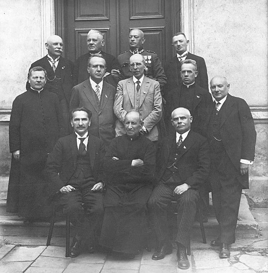 Uczestnicy 40-lecia matury z 1892 w I Gimnazjum w Rzeszowie w 1932. W rzędzie u góry od lewej: Roman Siciński, ks. Jan Czyrek, bar. ppłk tyt. Antoni Ferdynand Chitry de Freyselsfeld, Filip Neufeld. W środkowym rzędzie od lewej: ks. dr Maurycy Turkowski, Stanisław Breyer, Wacław Sobieski, ks. Szczepan Szydelski. W rzędzie u dołu od lewej: Michał Janik, Stanisław Trześniewski, Michał Skowroński, Józef Pirożyński.